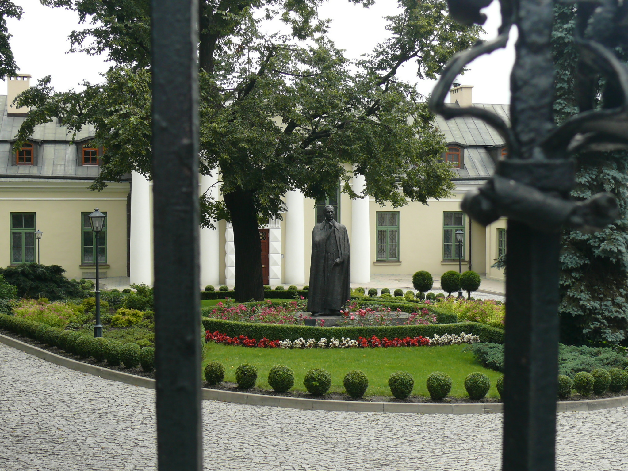 widok przez kratę ogrodzenia na dziedziniec Pałacu Biskupiego (siedziby Kurii Archidiecezjalnej) w Lublinie. Na klombie w centralnej części dziedzińca stoi posąg Kardynała Stefana Wyszyńskiego. Pałac wpisany do rej. zabytków pod nr A/463 z 17.03.1971, a ogrodzenie jako element osobny - pod nr A/463 z 17.03.1971